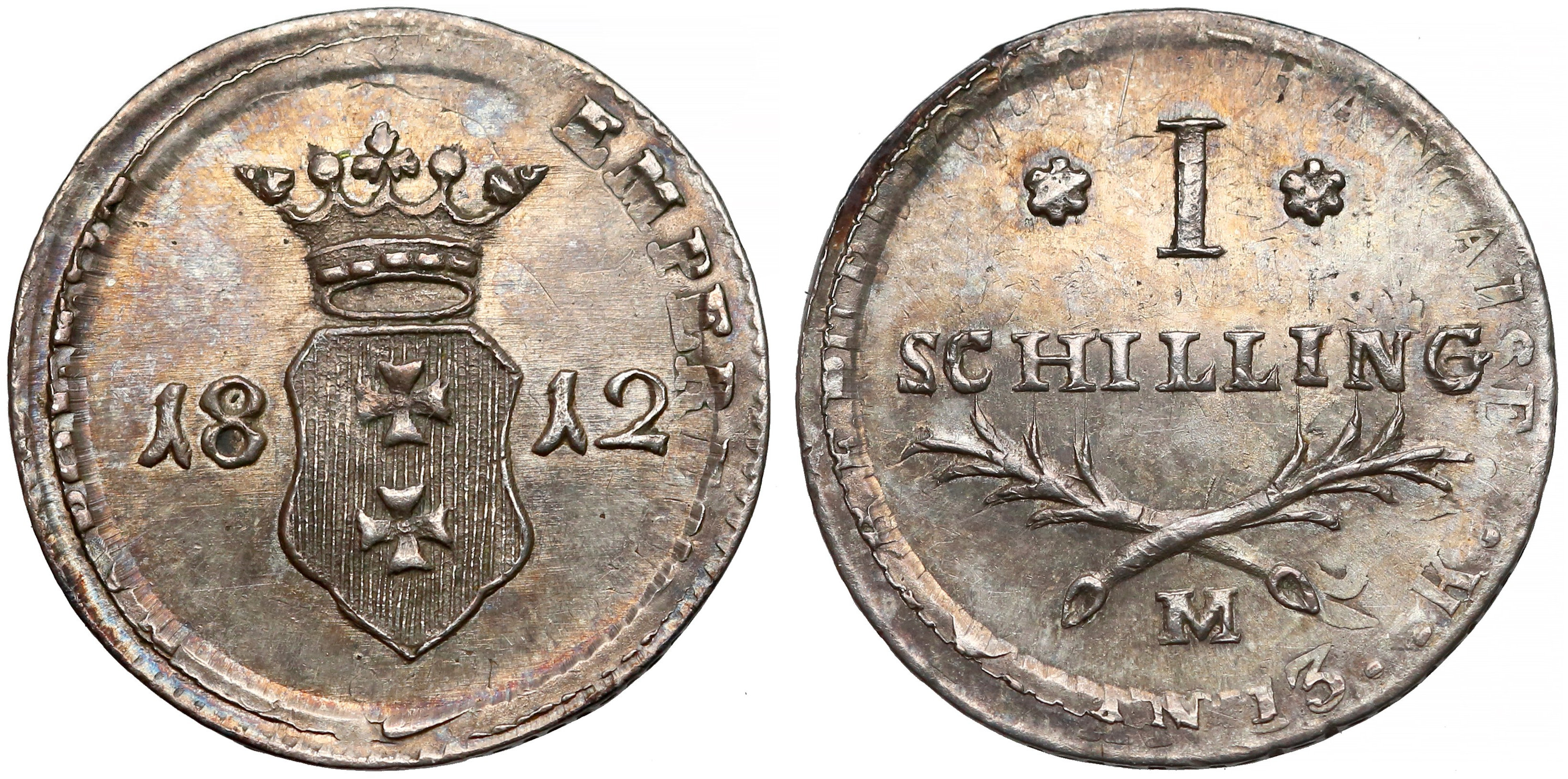 1 szeląg 1812 WMG srebro na monecie Napoleona